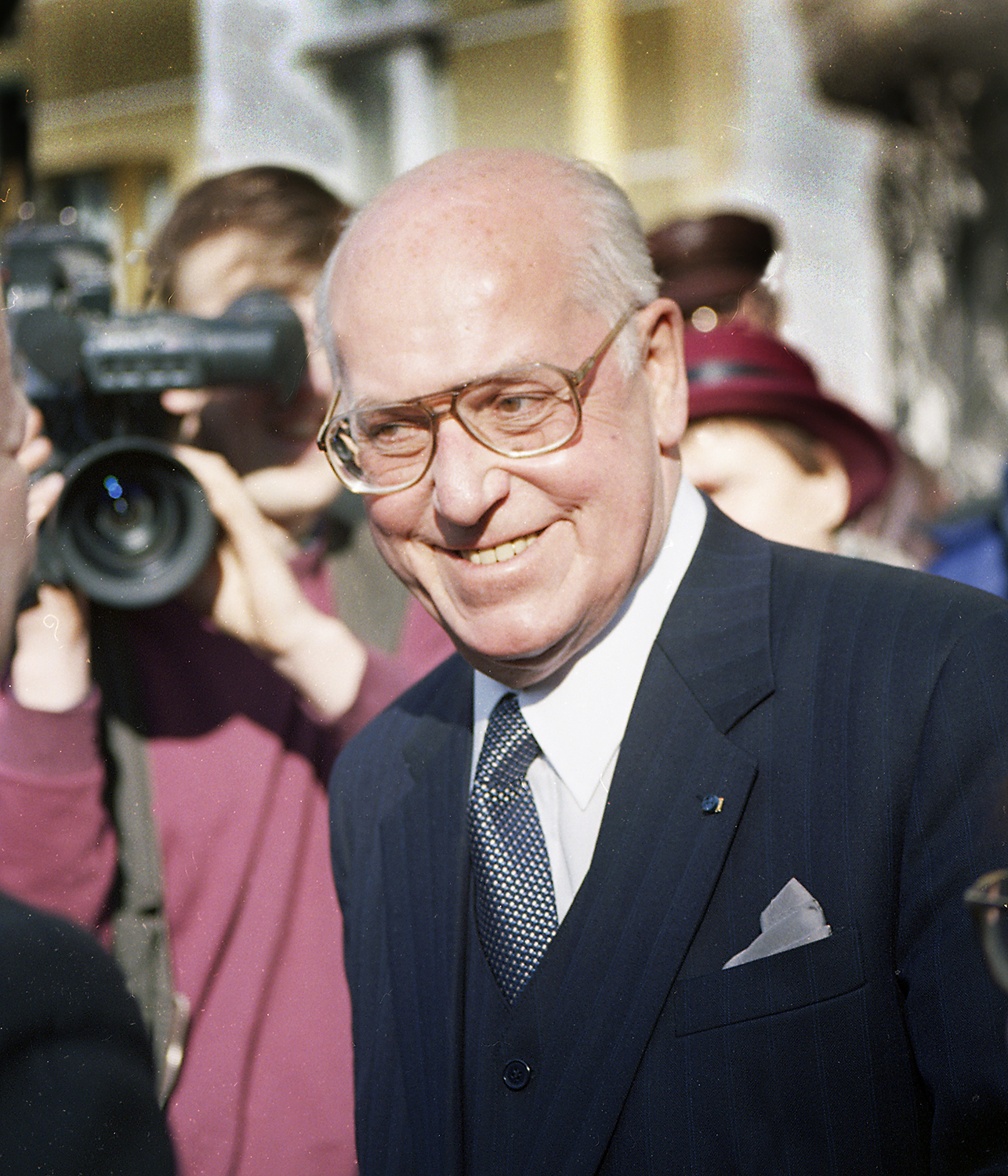 Lennart Meri, Raekoja platsil 99